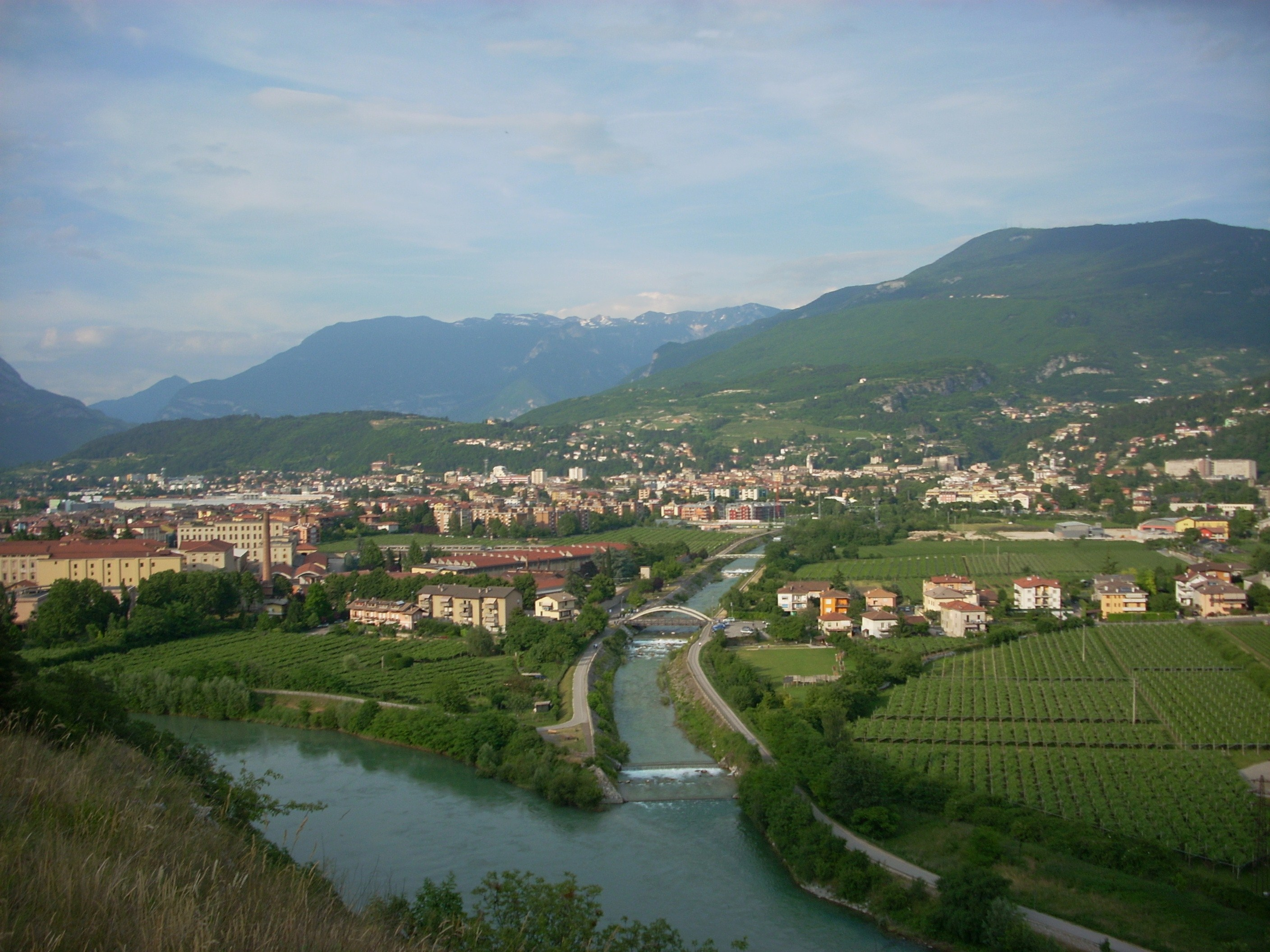 L'Adige alla confluenza con il Leno presso Rovereto